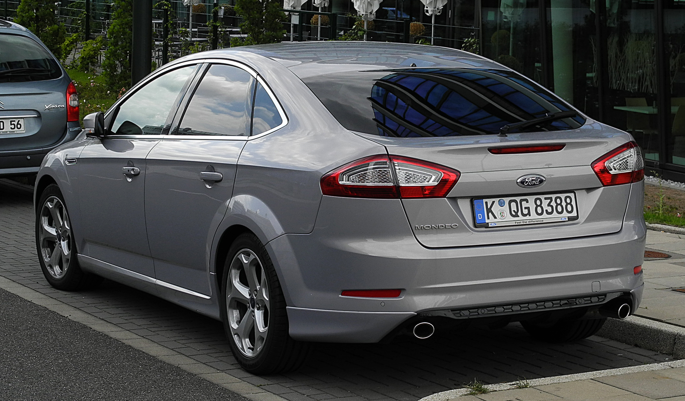 Ford Mondeo Titanium S (BA7, Facelift)